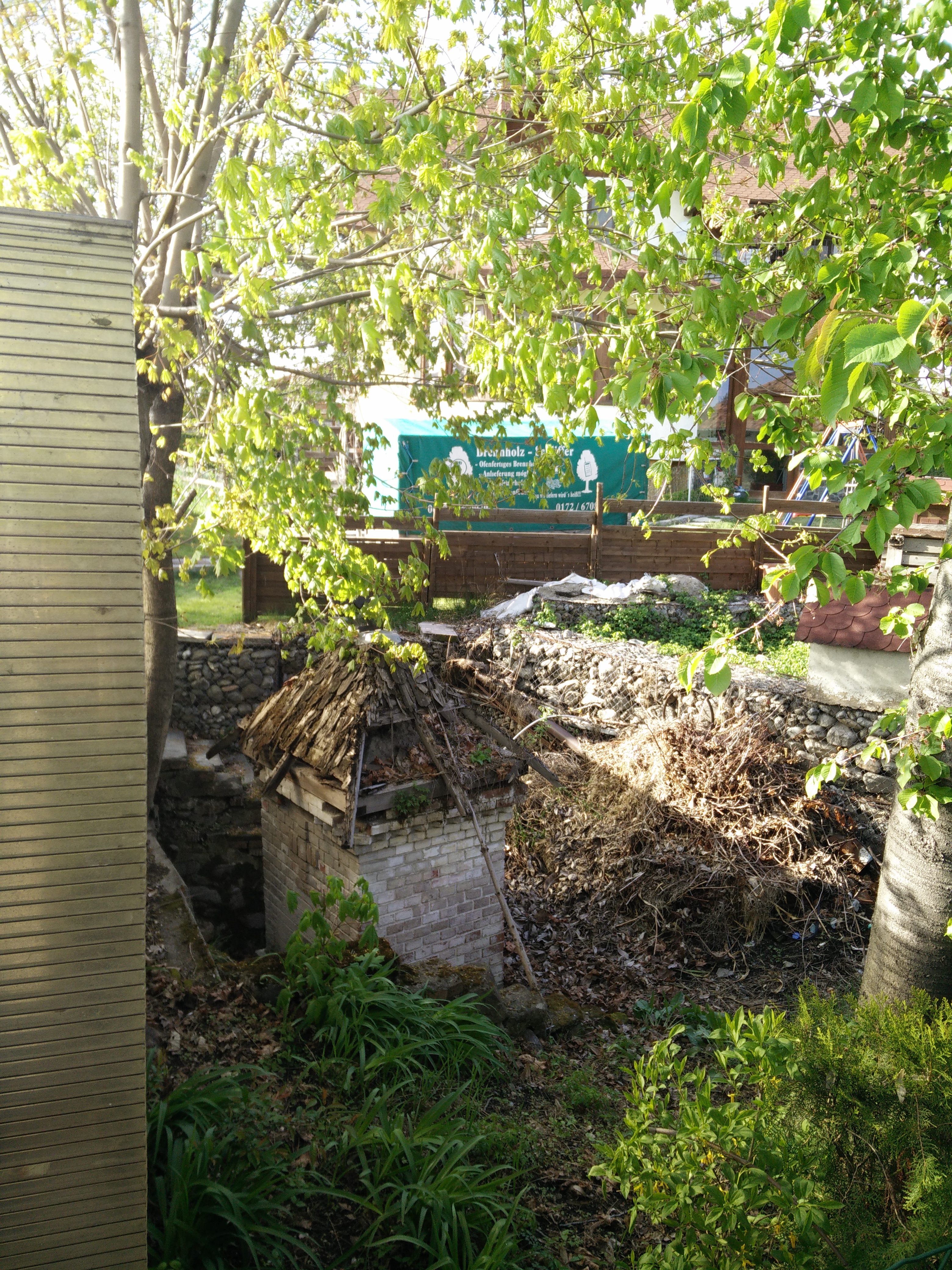 Fântâna Episcopului Ghenadie